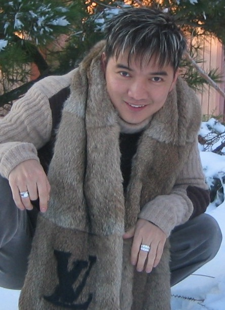 Đàm Vĩnh Hưng trong một chuyến du lịch ngoại quốc năm 2006